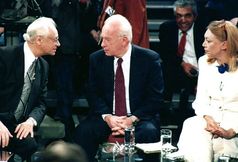 ראש הממשלה יצחק רבין והסאטיריקן אפריים קישון עם דניאלה שמי בתכנית מיוחדת ליום העצמאות